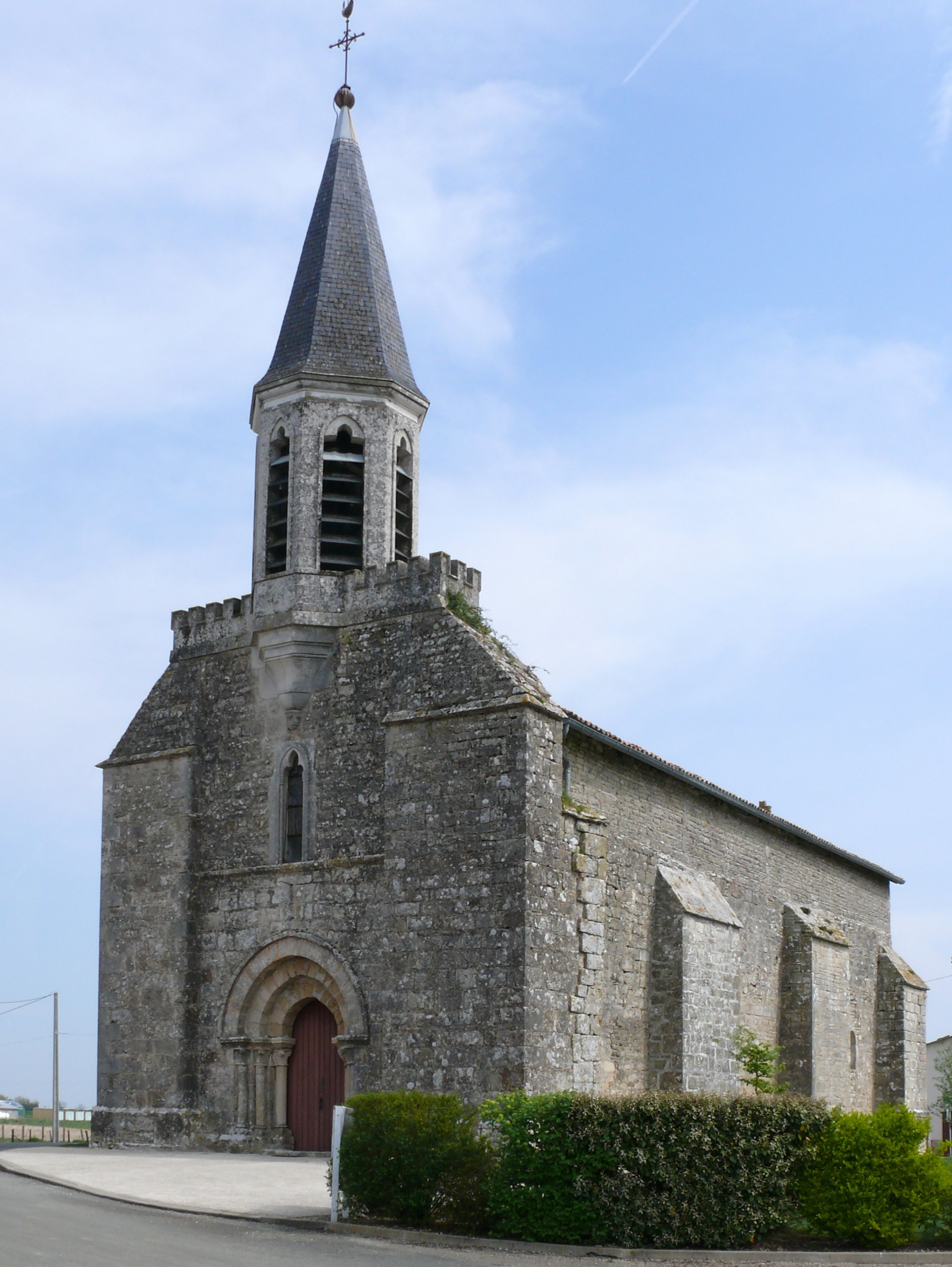 Église de Messé